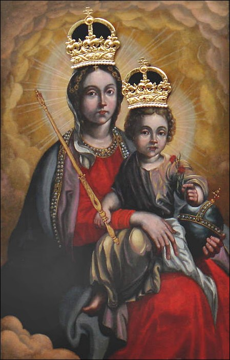 Matka Boża Trybunalska koronowana